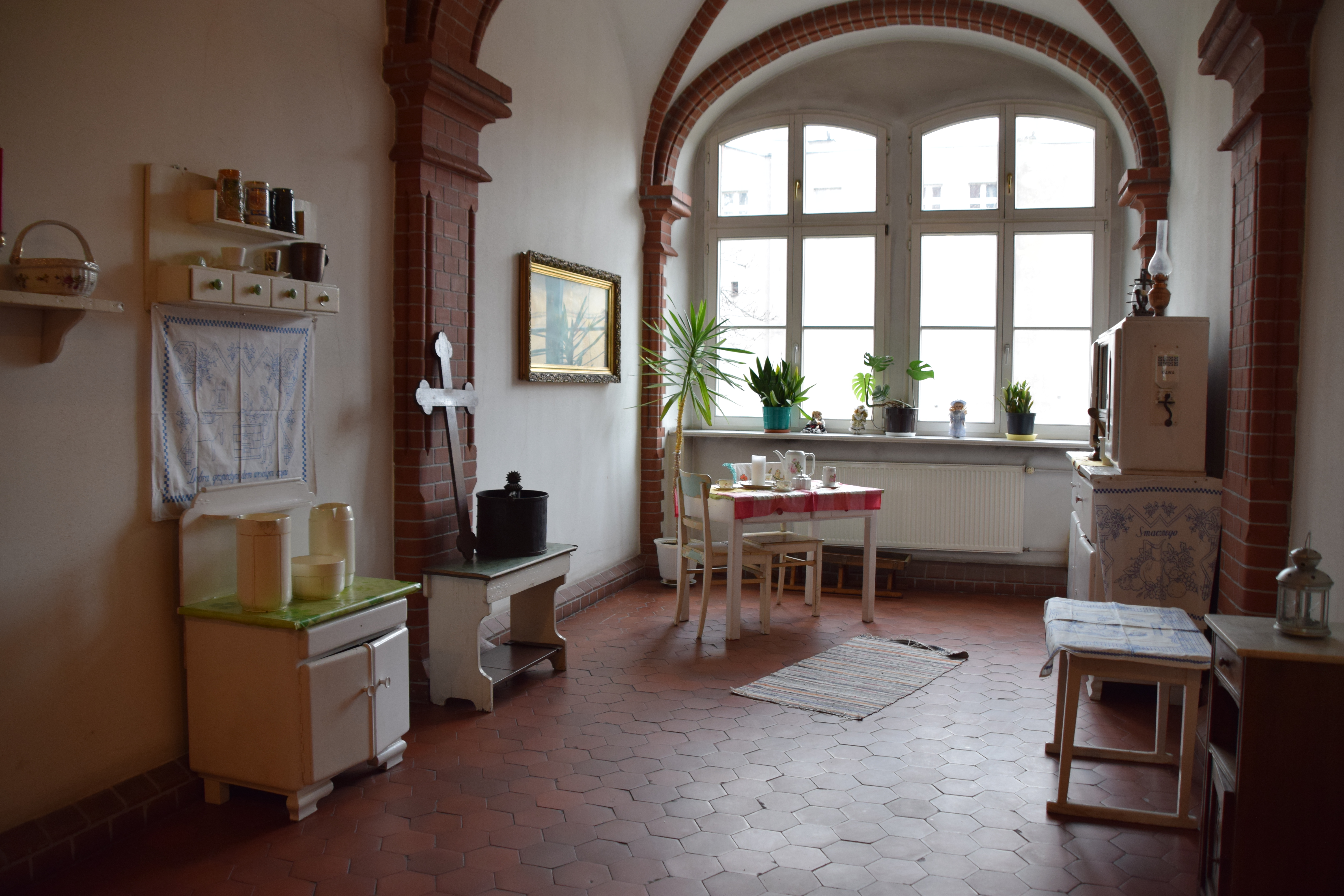 VILO kącik regionalny